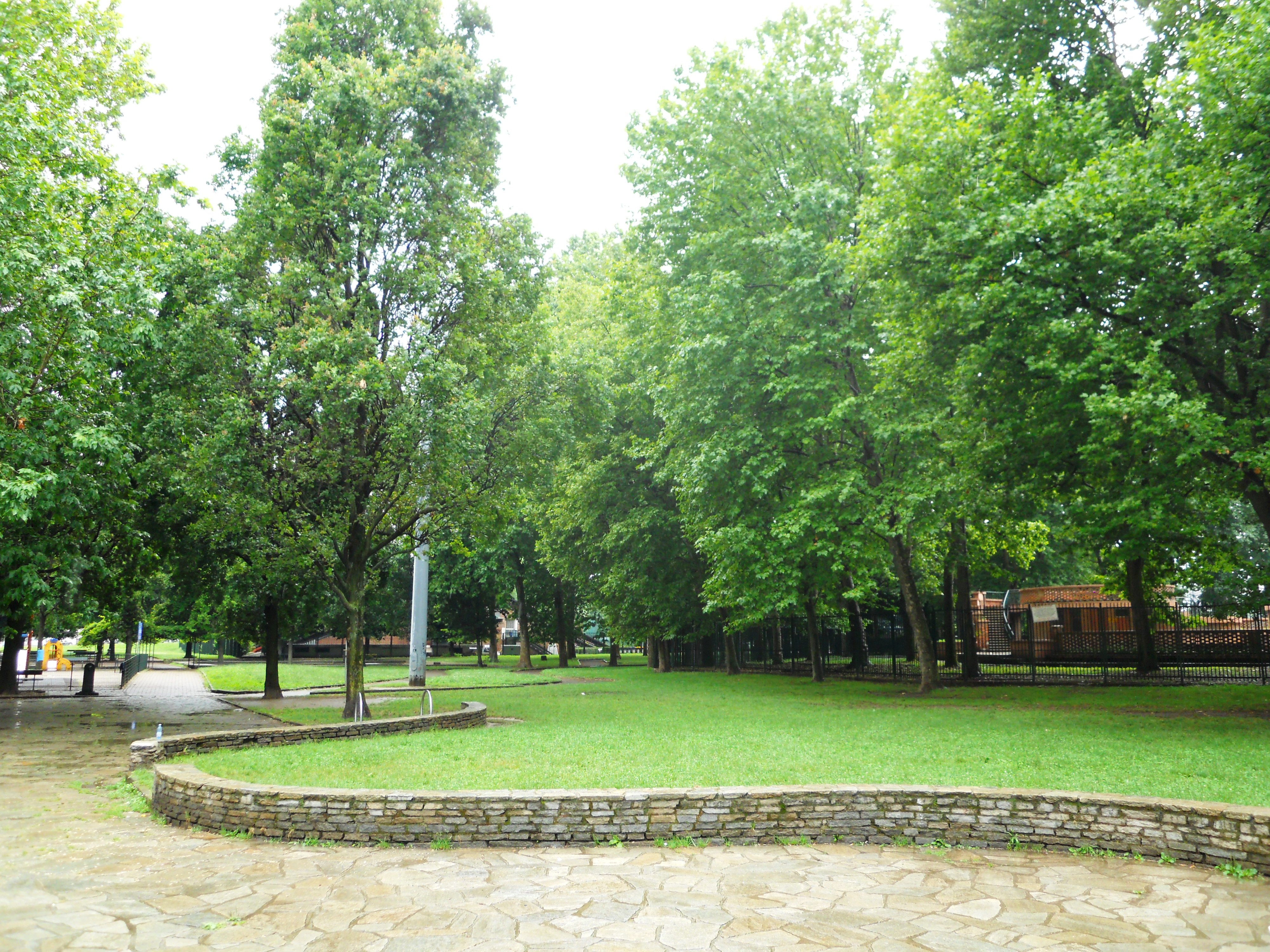 La piscina Sempione vista dal Parco